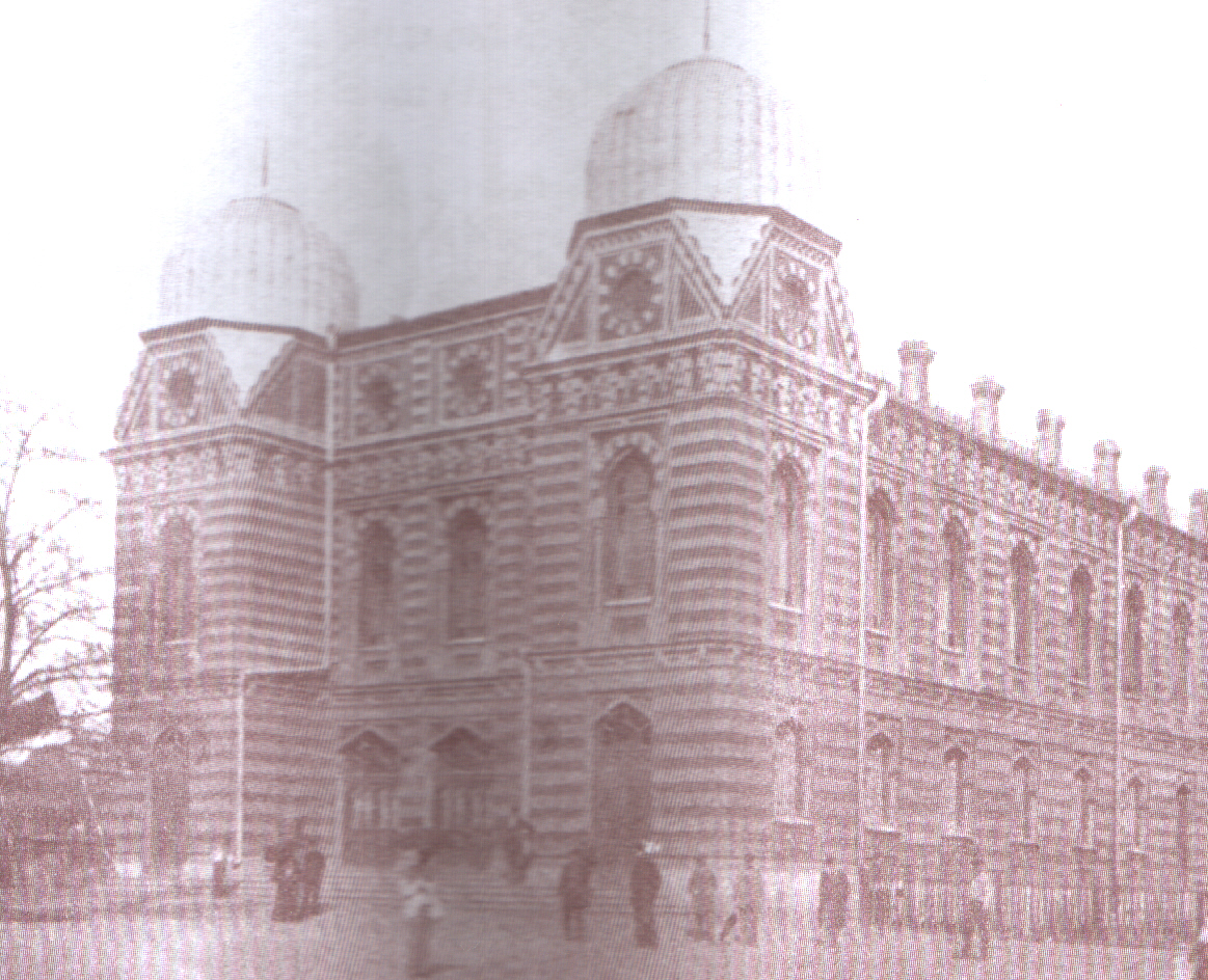 Єлисаветградська Велика хоральна синагога, старе фото